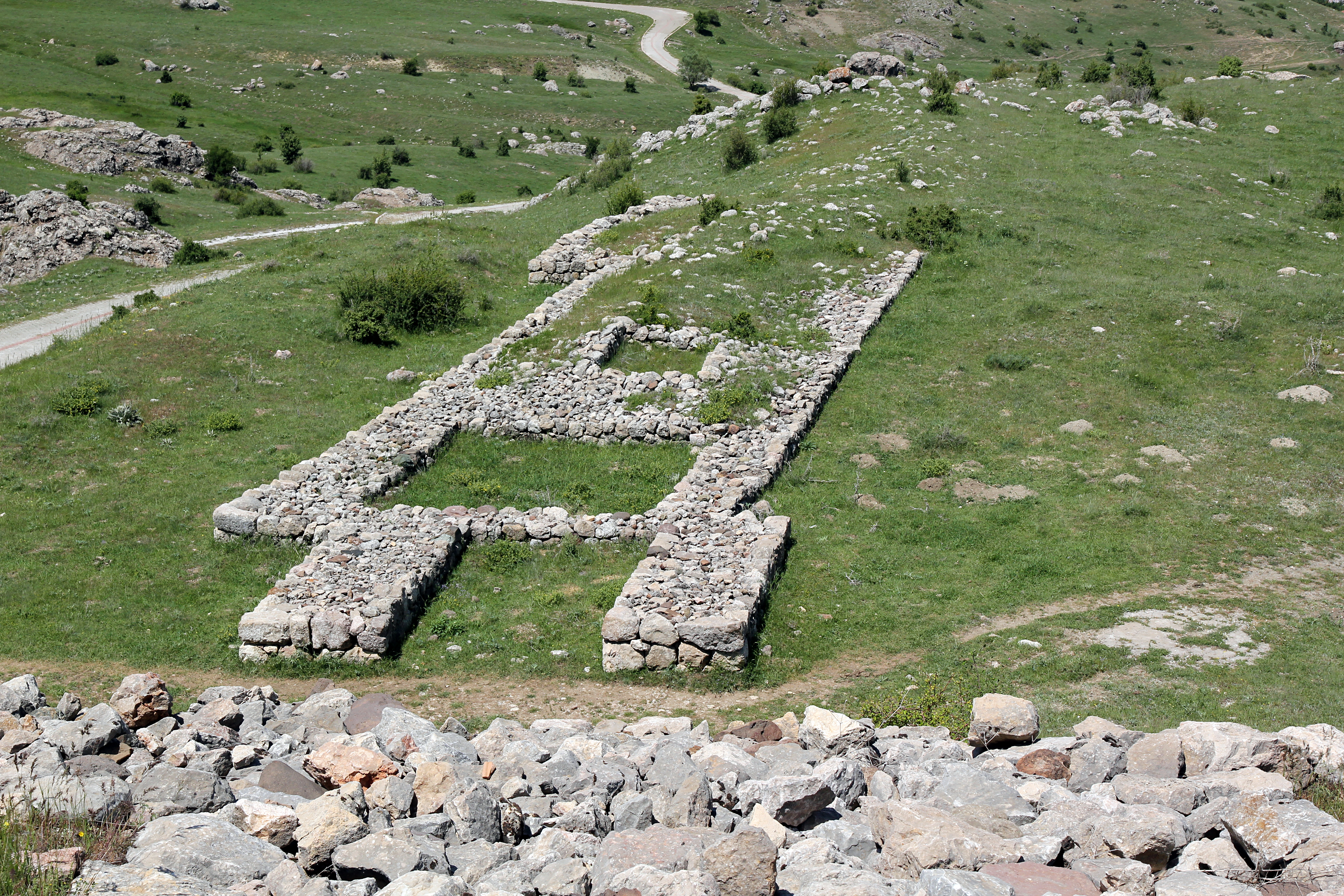 Büyükkale, die Zitadelle der hethitischen Hauptstadt Hattuša bei Boğazkale, Zentraltürkei, Tor in der Poternenmauer am westlichen Fuß des Burghügels